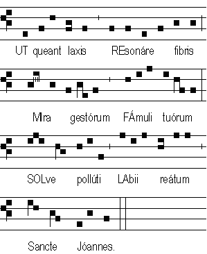 Hymne de Saint Jean Baptiste, origine des notes de la gamme moderne